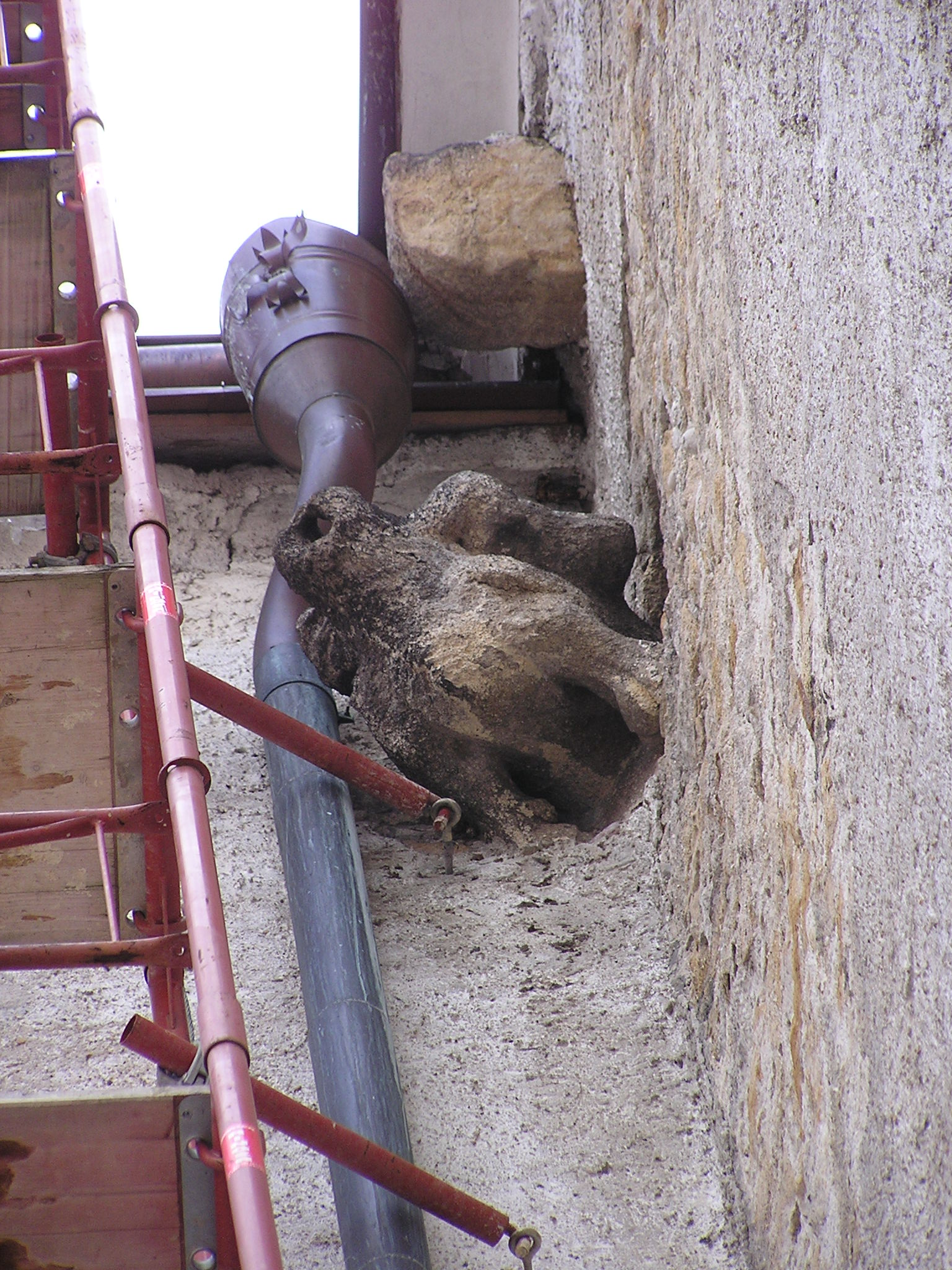 Kamenná žába na zdi kostela